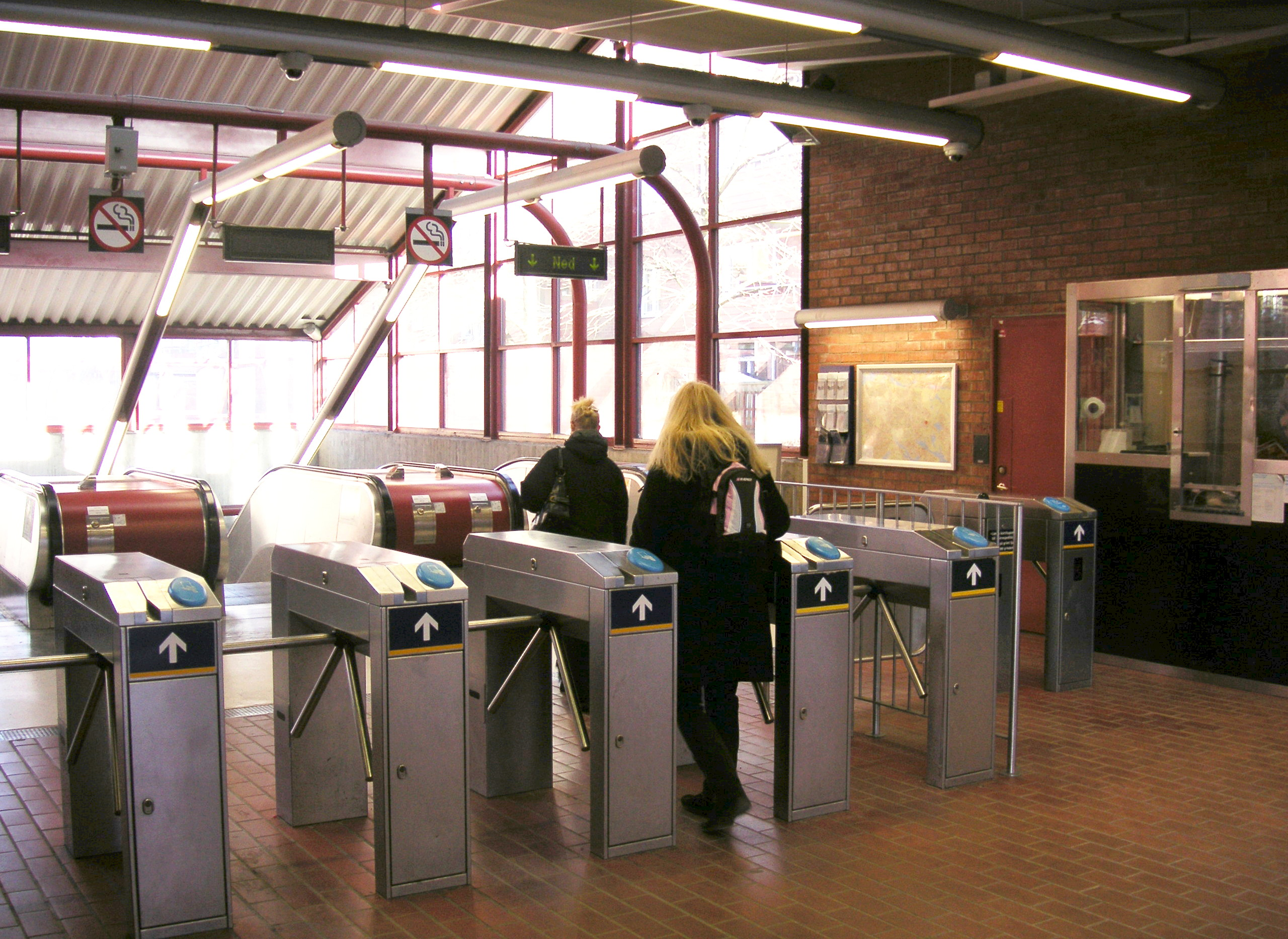 Skarpnäck T-banestation